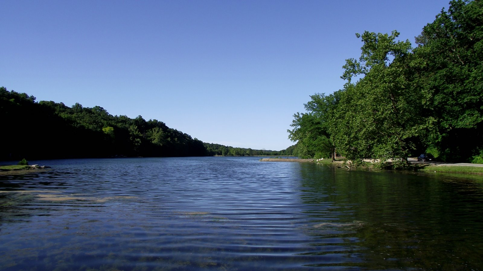 Lake Atalanta in Rogers, Arkansas.